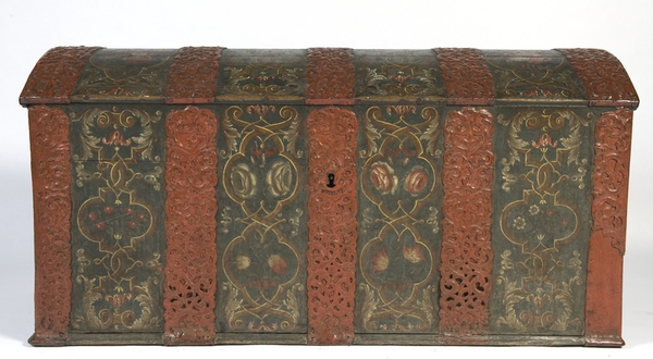 Kiste fra første halvdel av 1700-tallet. Dekorert med regencemotiver. Fra Tjølling i Vestfold. Lengde 140 cm. Foto Anne-Lise Reinsfelt, Norsk Folkemuseum, NF.1987-1243.